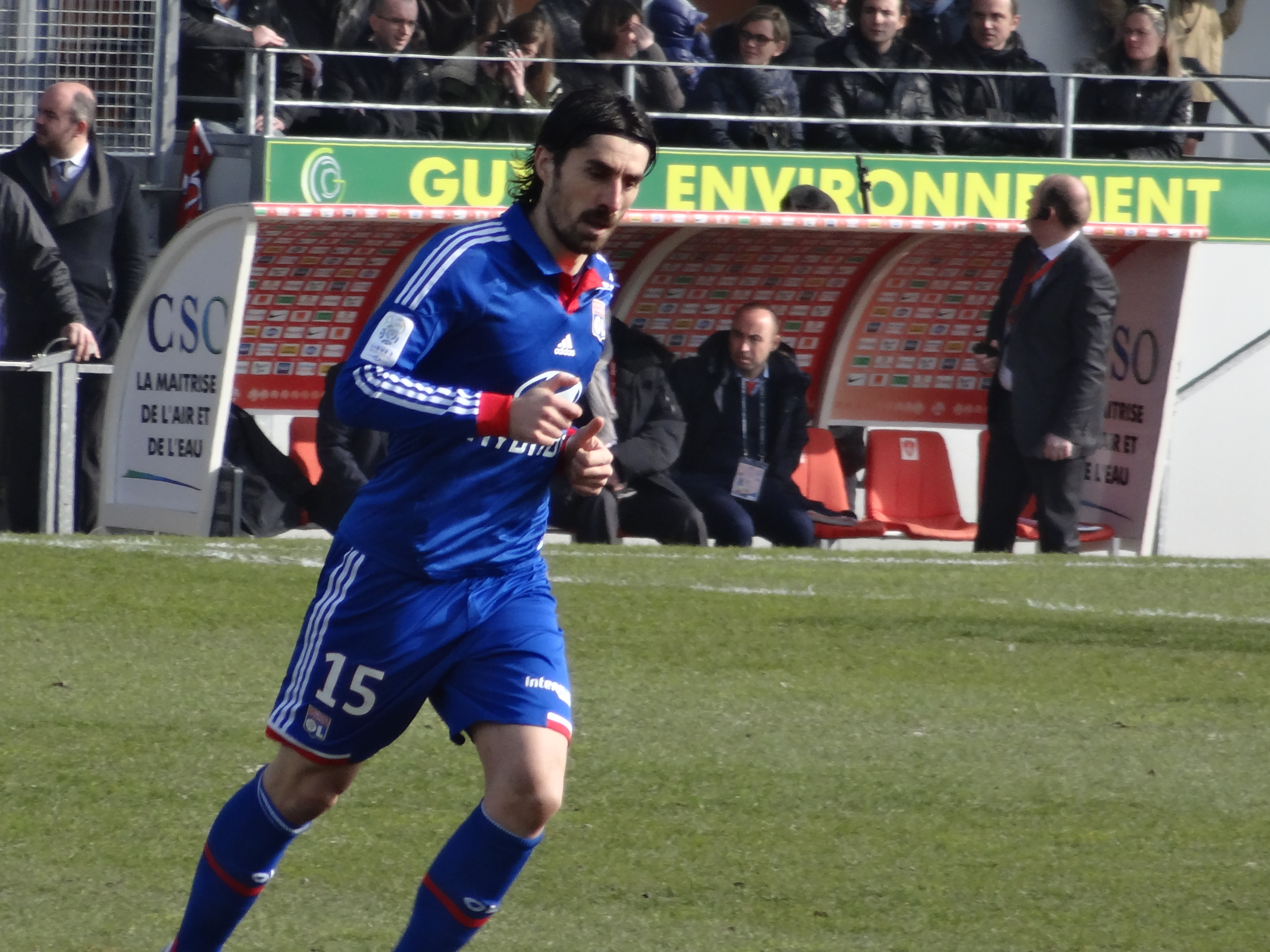 Match de football (Ligue 1) entre le Stade brestois 29 et l'Olympique lyonnais, le 3 mars 2013